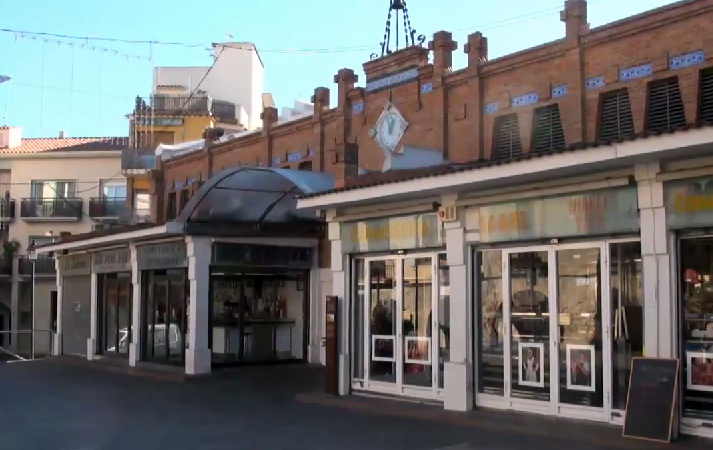 Exterior del Mercado de Pere San de estilo modernista, situado en Sant Cugat del Vallès